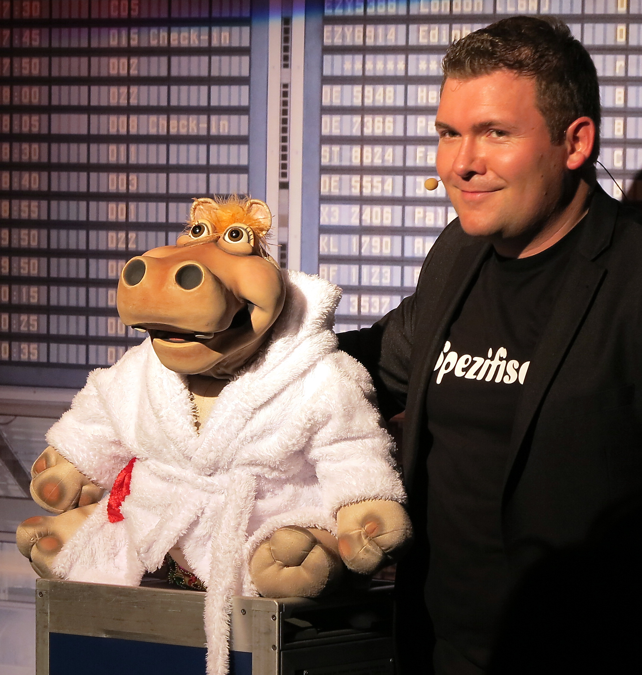 Bauchredner Pierre Ruby mit seiner Puppe Amanda im Münchner Schlachthof im März 2012